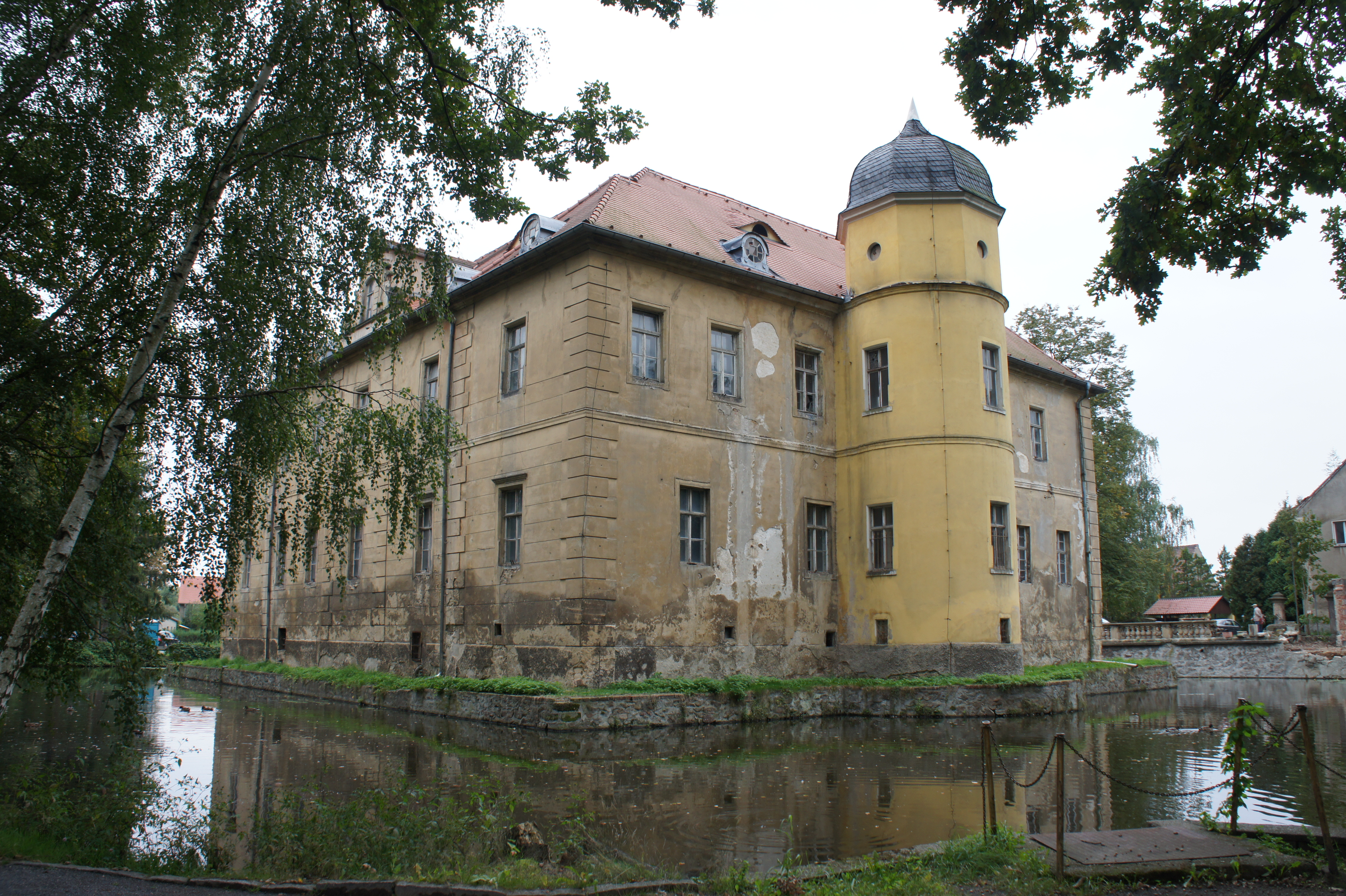 Schloss Berbisdorf, Wasserschloss, Ersterwähnung 1445 als Rittersitz